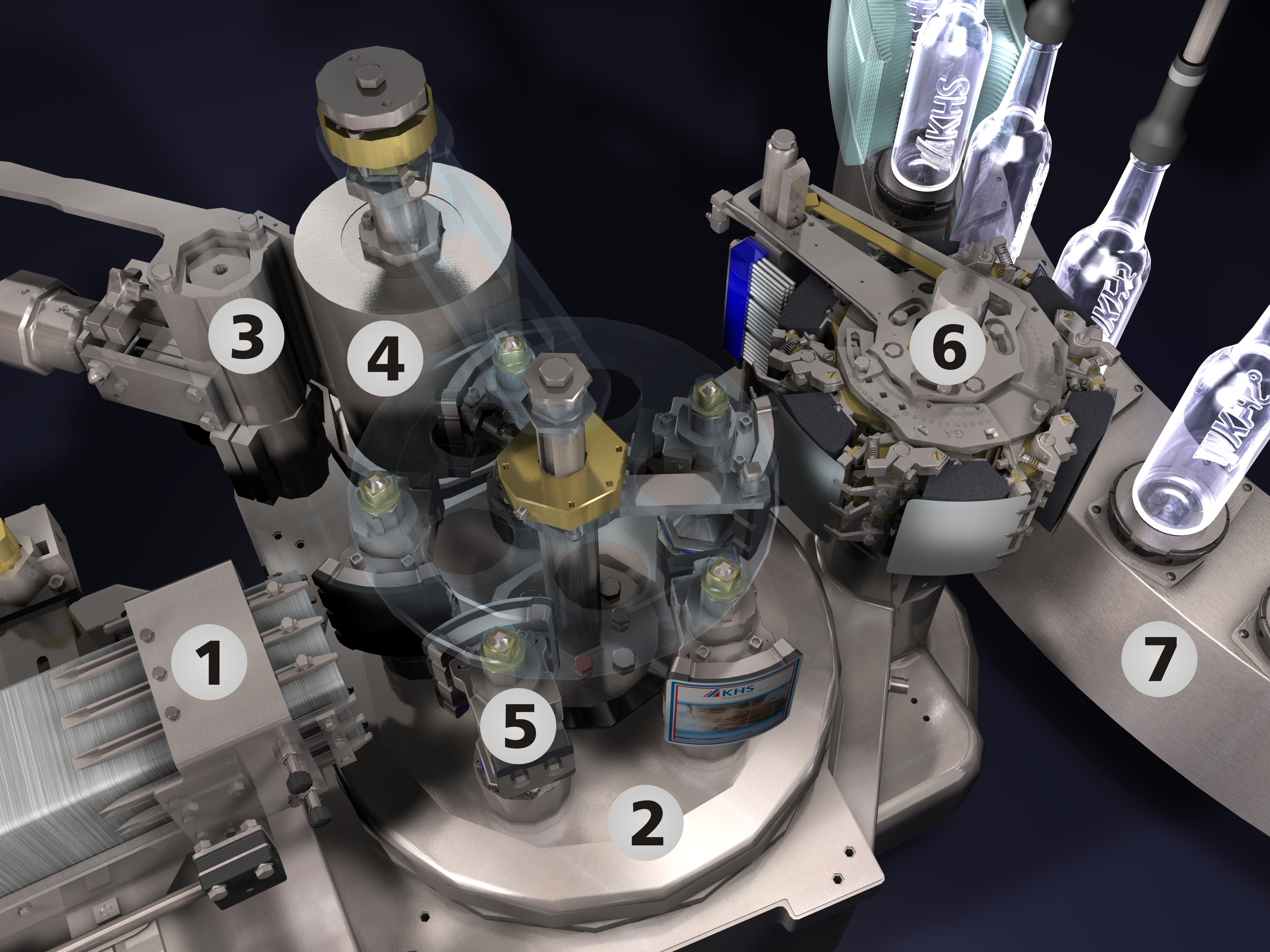 Schematische Darstellung einer Kaltleim-Etikettierstation 1: Etikettkasten mit Etikettenmagazin 2: Stationsgehäuse mit den innenliegenden Kurvenbahnen 3: Leimschaber zur Regulierung der Leimauftragsstärke 4: Leimwalze 5: Leimsegmente 6: Greiferzylinder 7: Flaschenträger